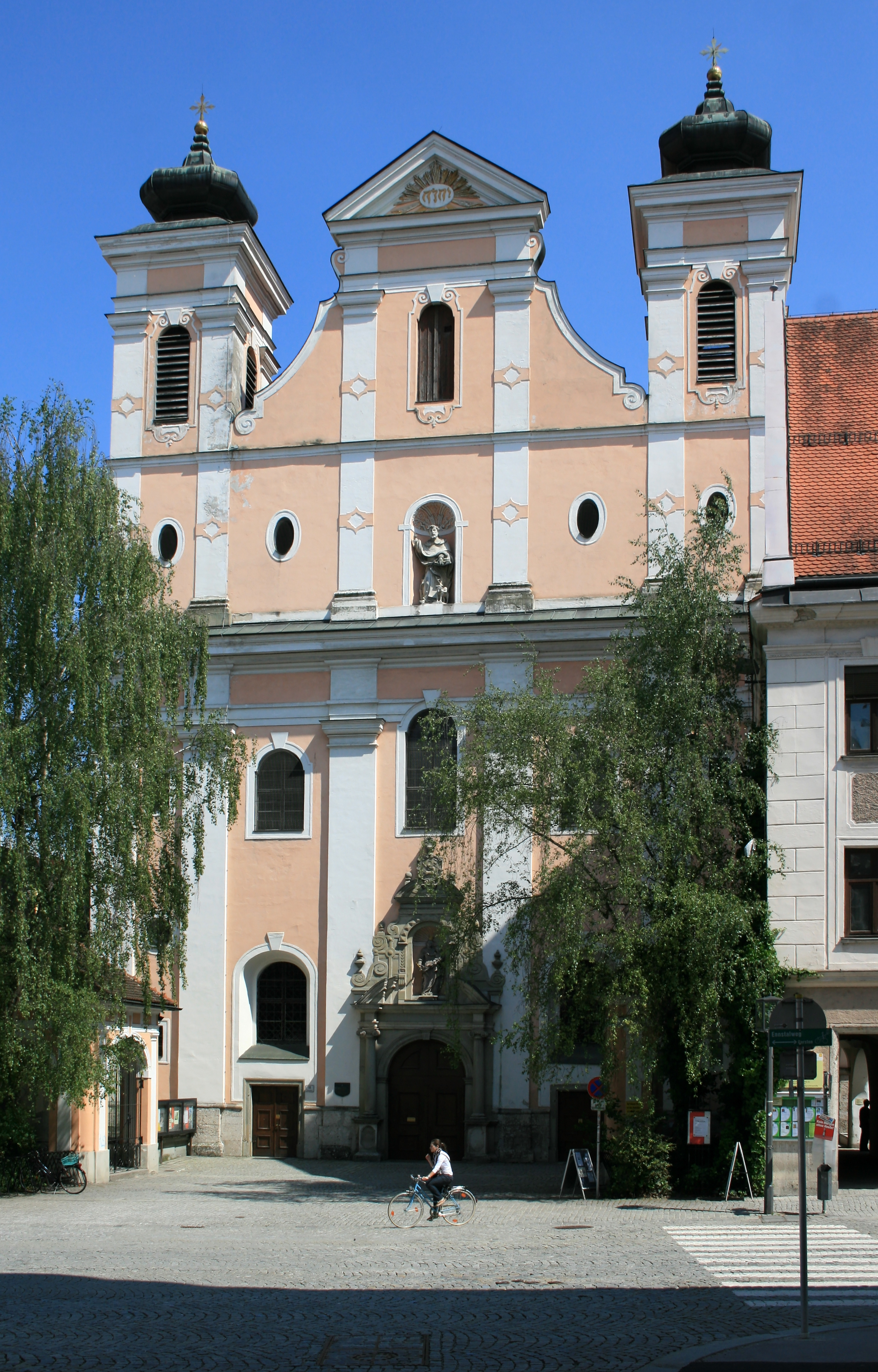 Front der Steyrer Marienkirche zum Hauptplatz